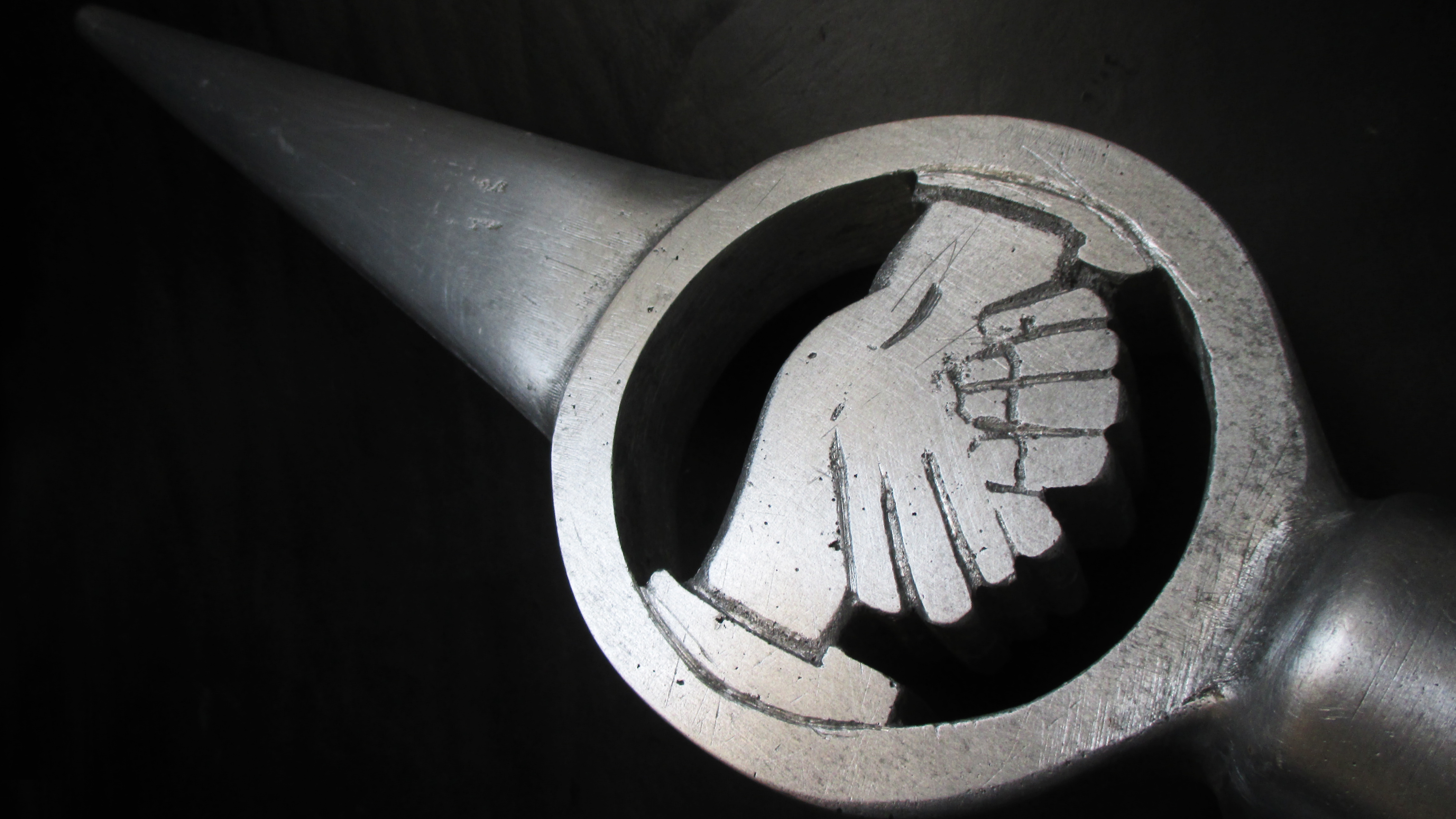 Fahnenspitze_SED_DDR_Frühe Ausführung_1